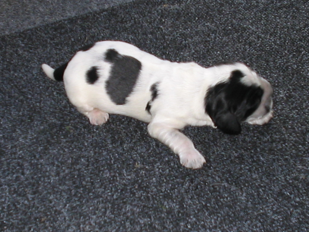 kruipende puppy